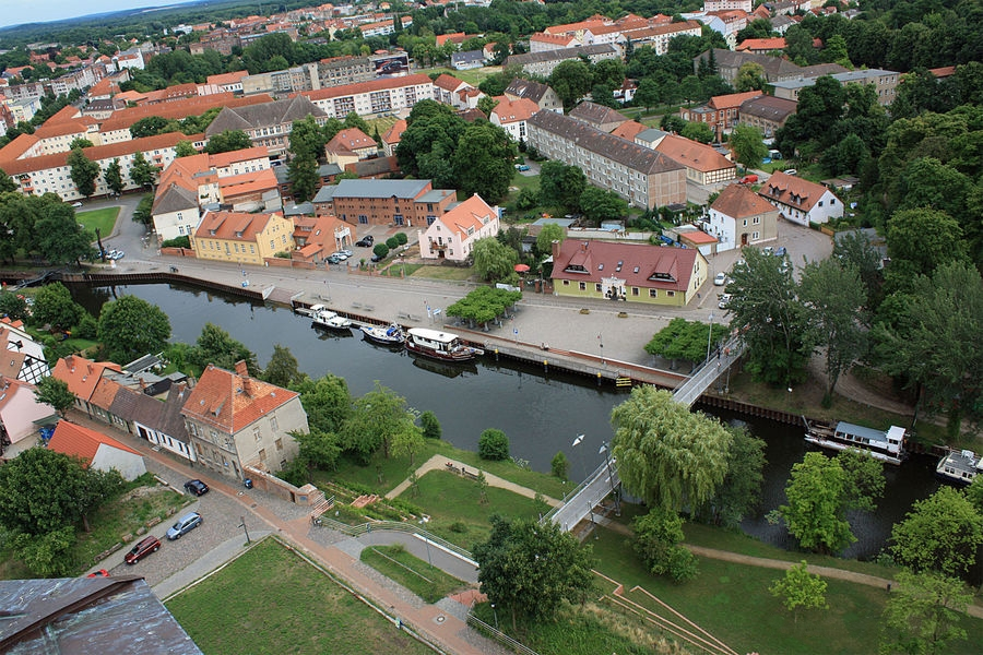 Luftbildaufnahme Hafenpromenade